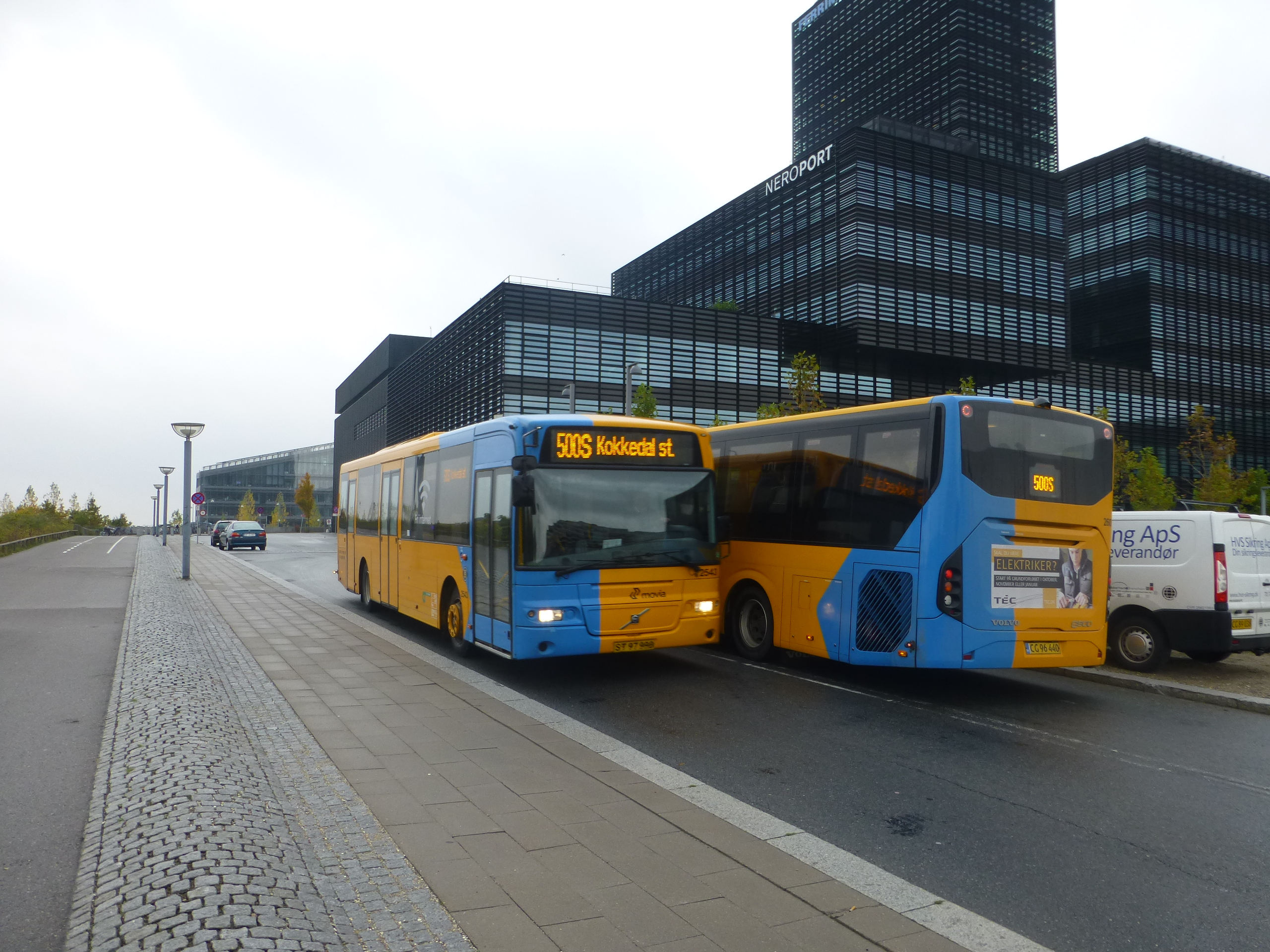 Two buses on line 500S on Kay Fiskers Vej in Ørestad in Copenhagen.